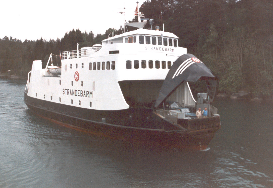 MF Strandebarm built 1971.